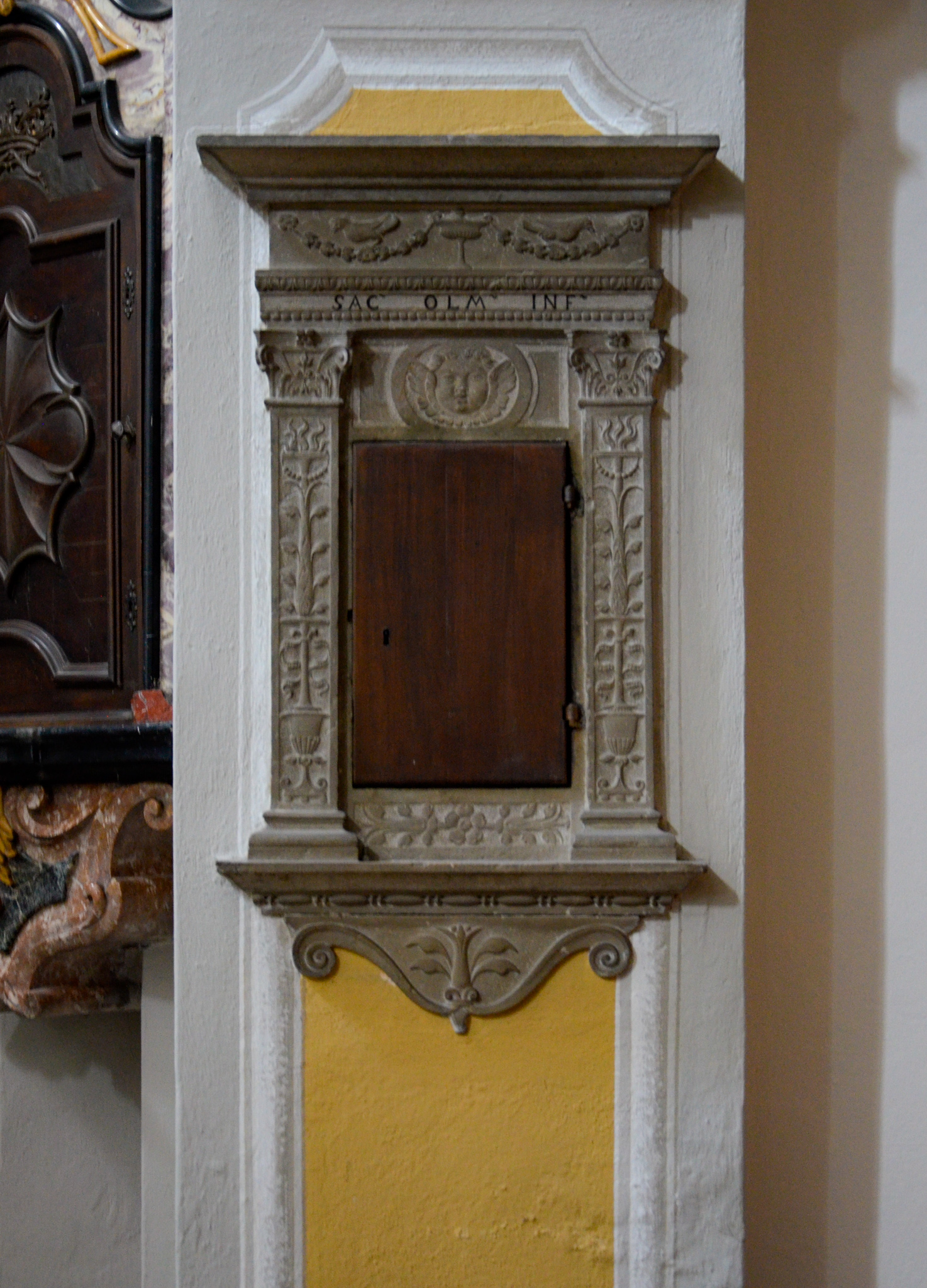 Armadietto rinascimentale per gli Oli Santi in pietra di Saltrio - Chiesa parrocchiale di San Michele Arcangelo di Brusino Arsizio